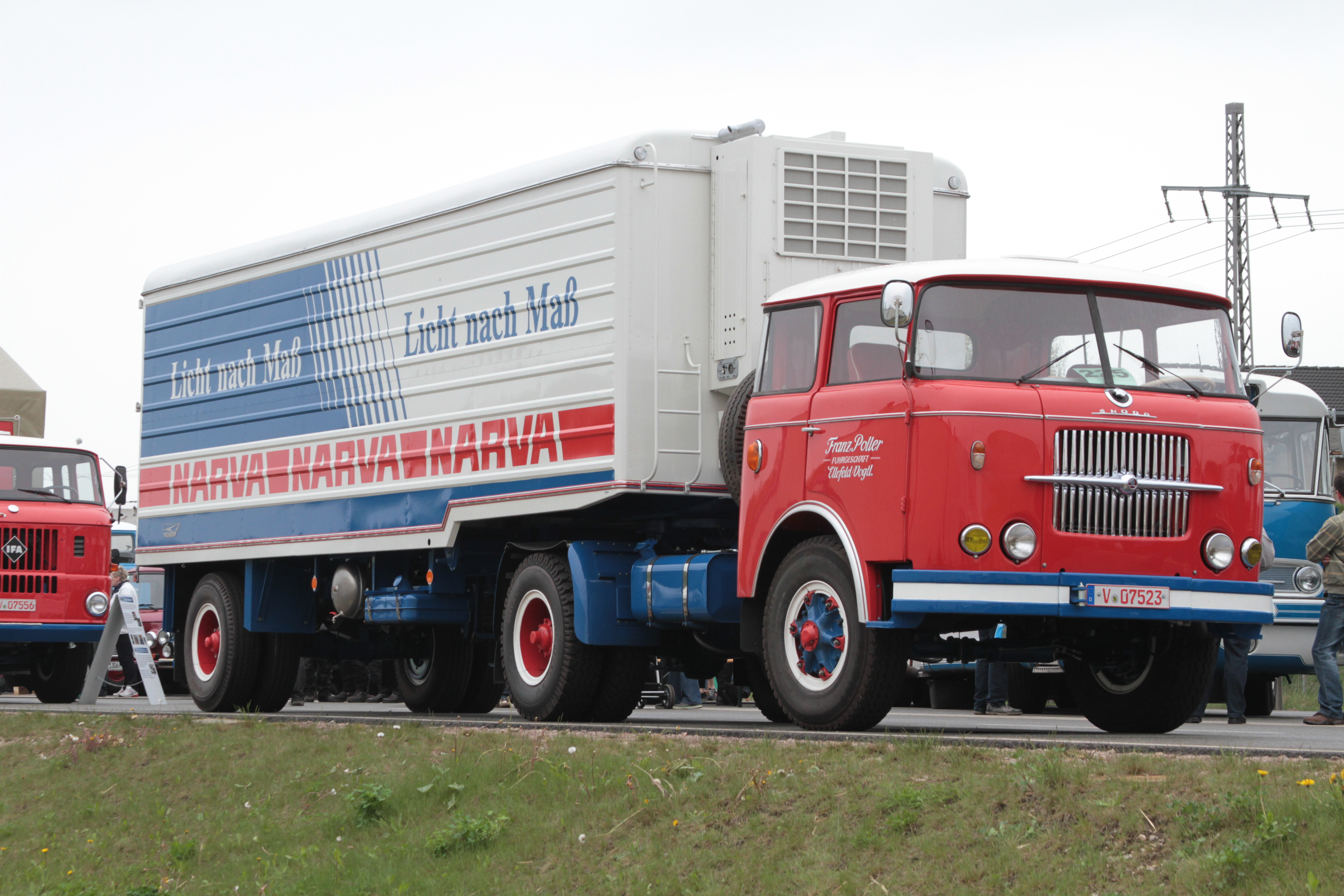 16. IFA Oldtimertreffen Werdau 2013, Germany